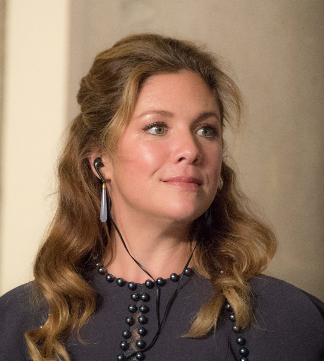 Visita Oficial del Primer Ministro de Canadá, Justin Trudeau